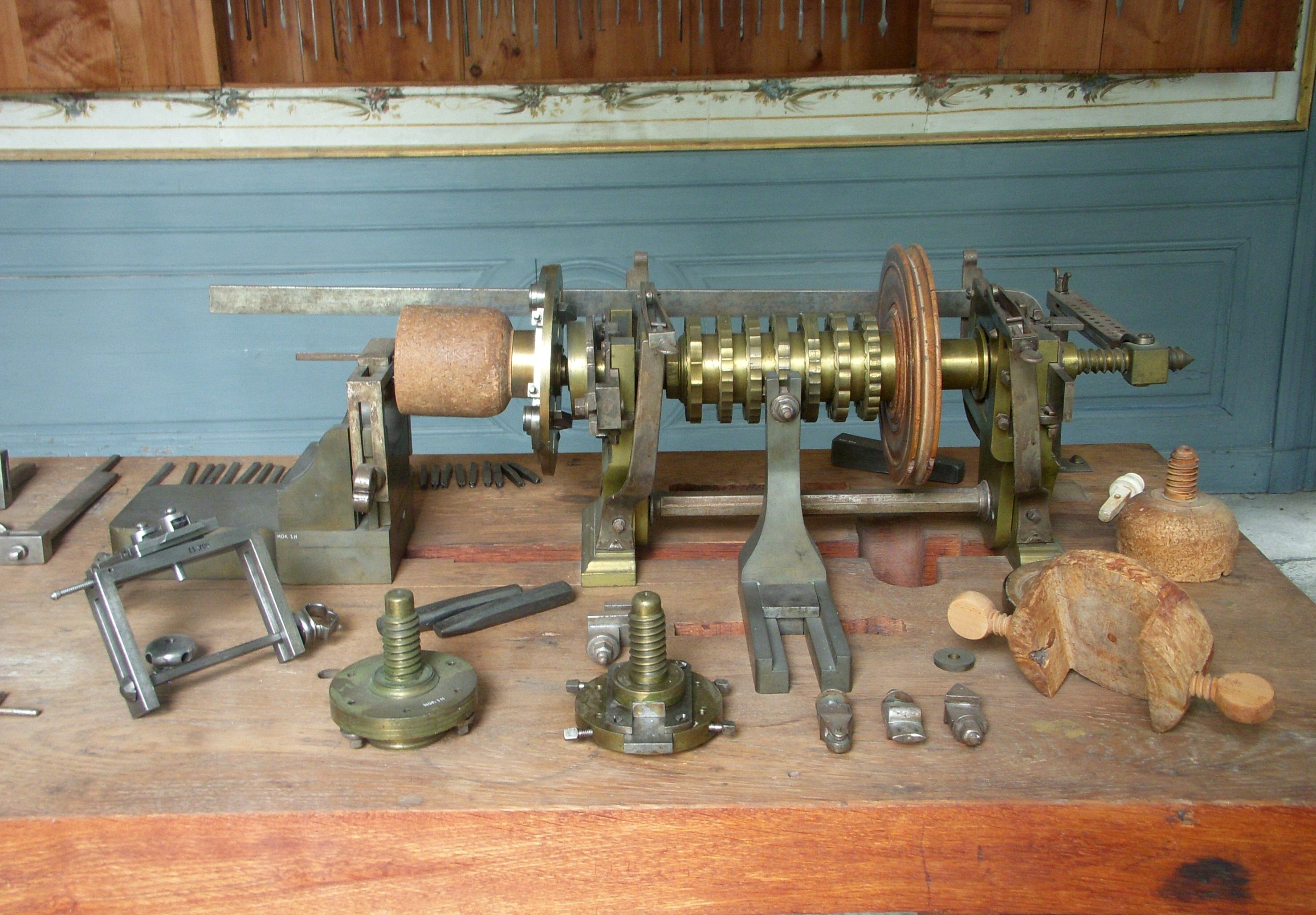 Adolf Fredriks svarv i "Biljardrummet" på Kina slott